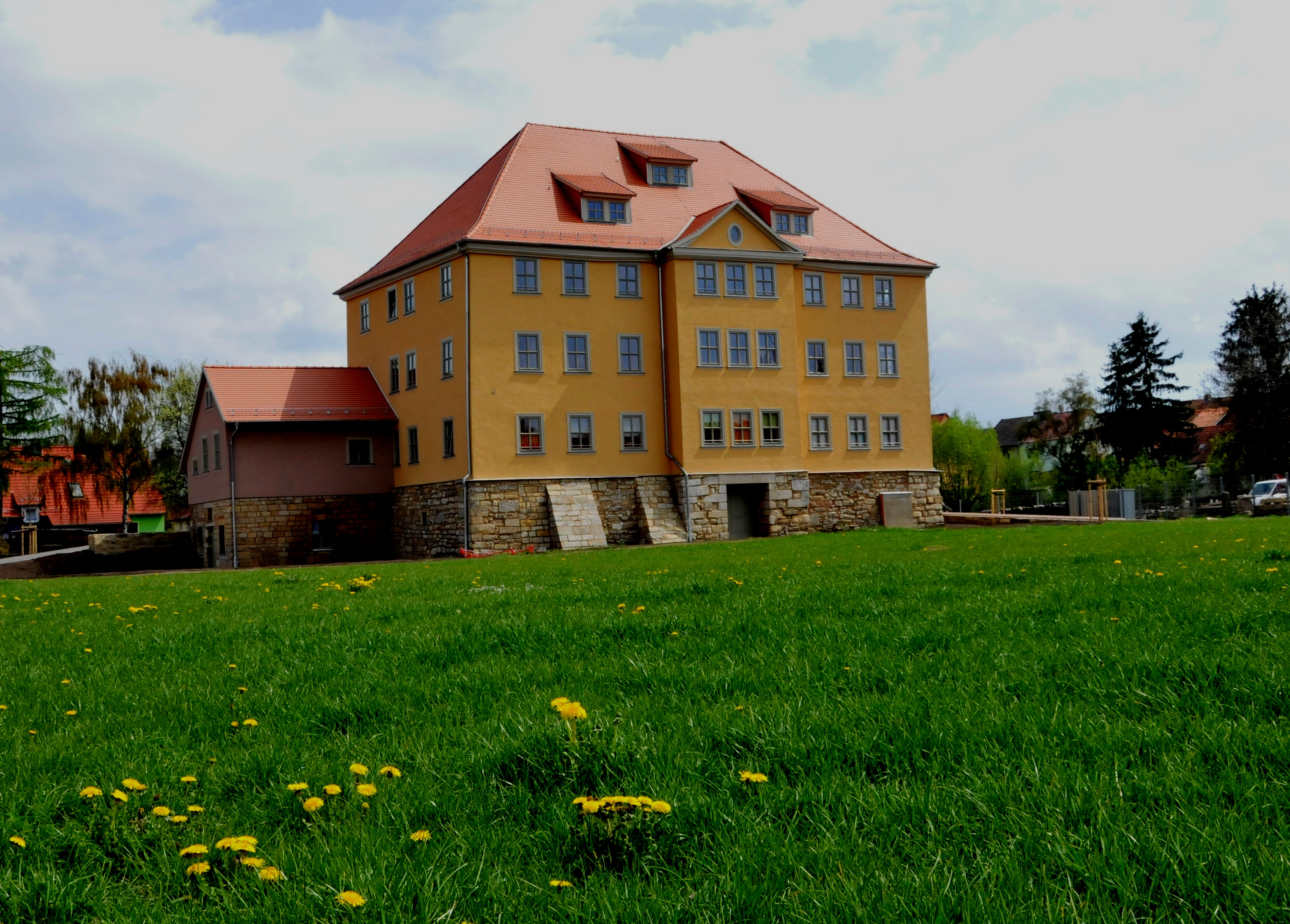 Herrenhaus in Wechmar